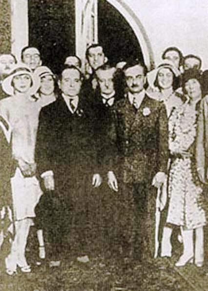 Getúlio Vargas (1882-1954) e João Pessoa (1878-1930) pouco antes da Revolução.